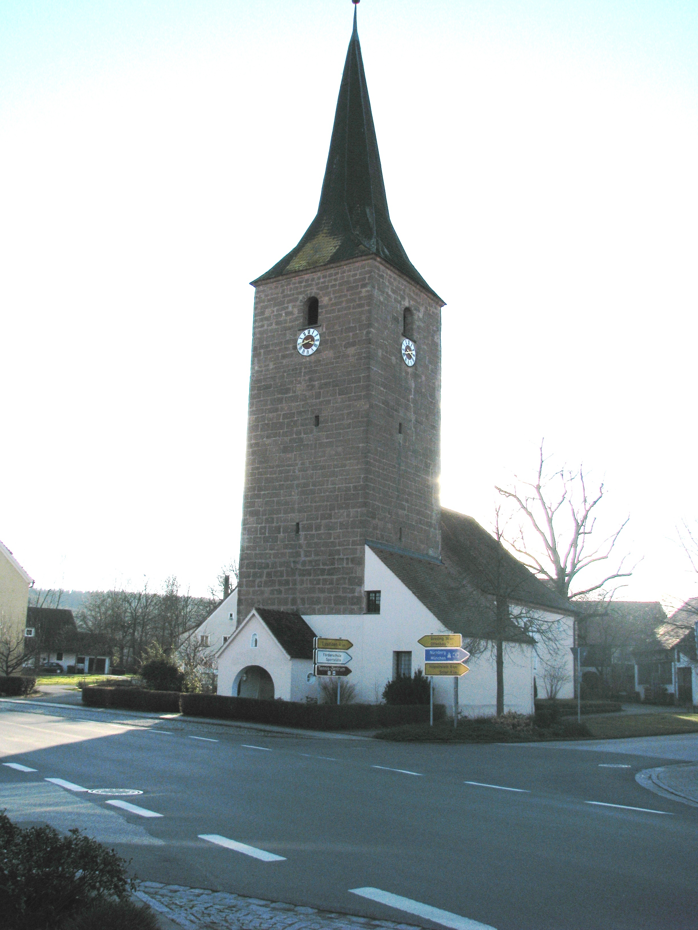 Weinsfeld, Ortsteil von Hilpoltstein im mittelfränkischen Landkreis Roth, Pfarrkirche St. Michael